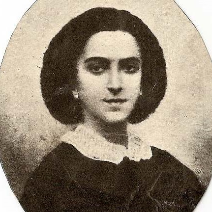 Carmen Nóbrega Miguens, esposa del Presidente Nicolás Avellaneda